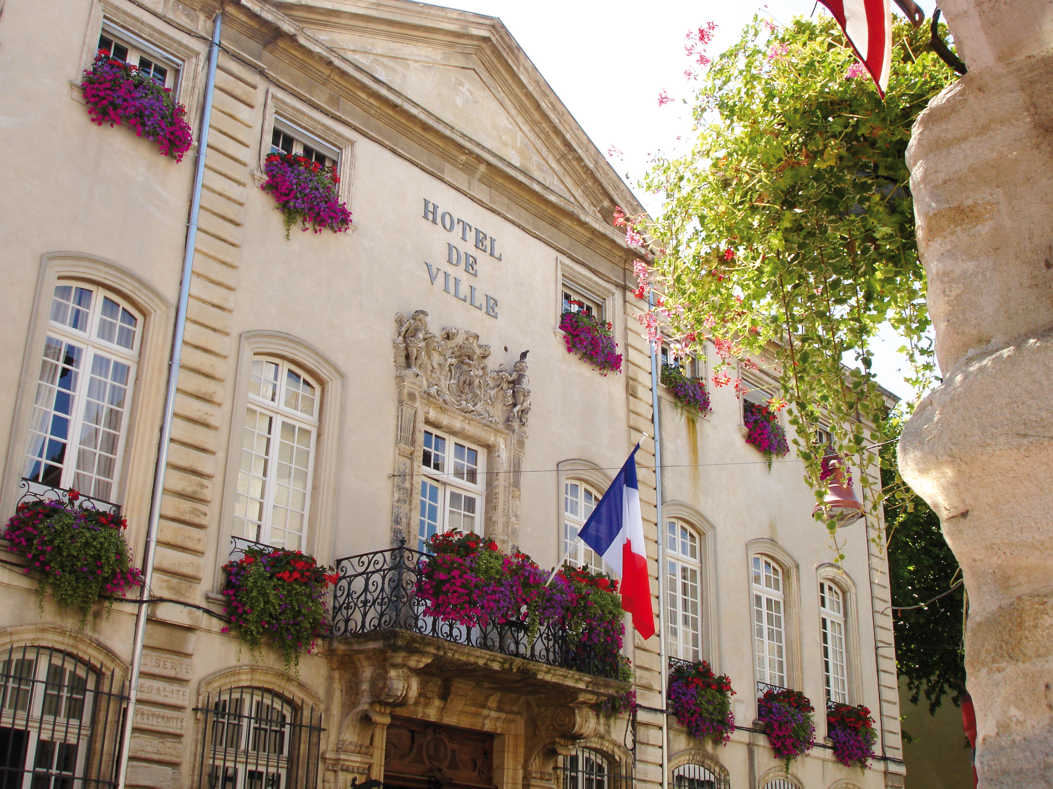 Façade de l'Hôtel de Ville de Carpentras.